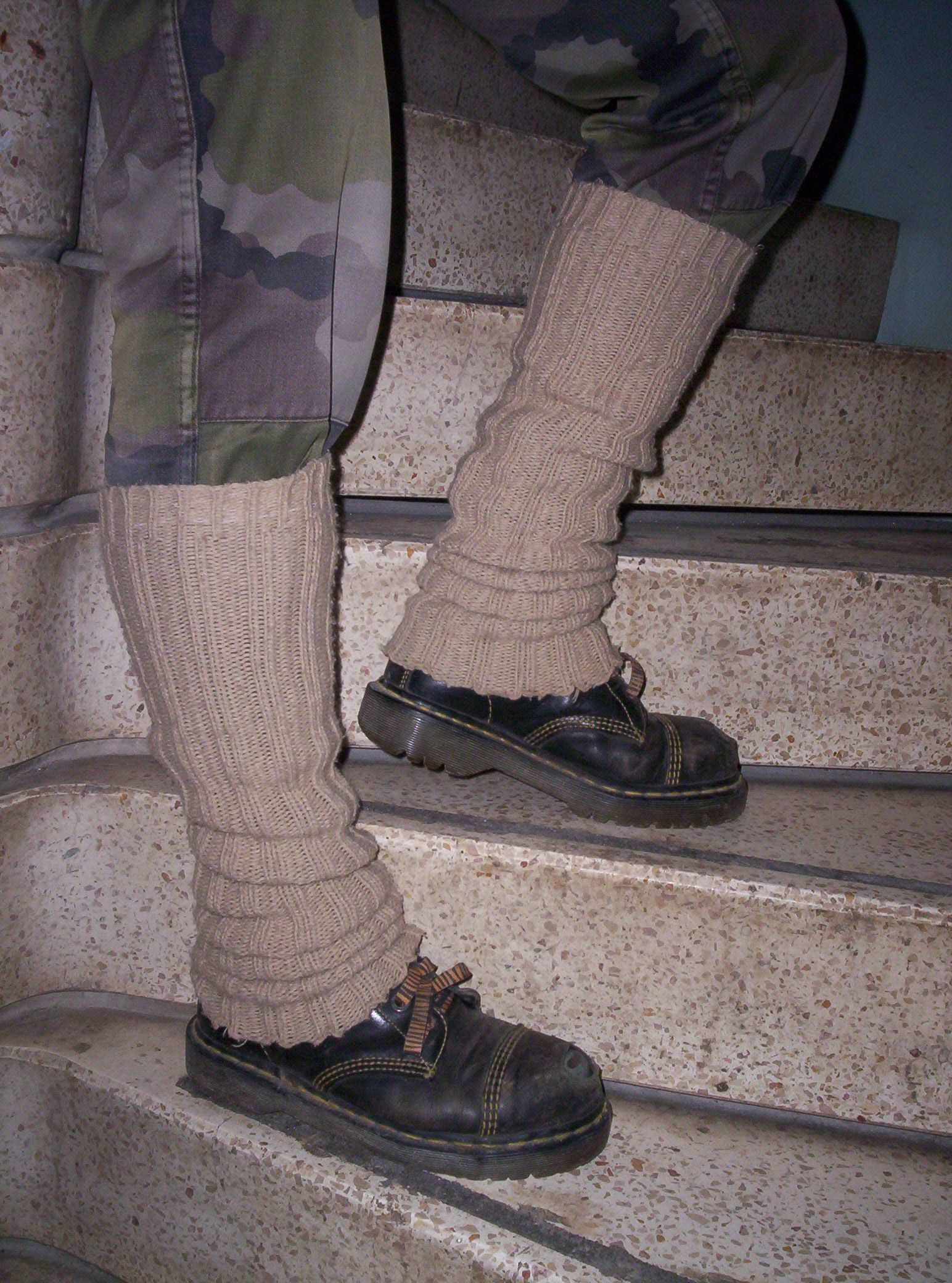 Jambiere01.jpg